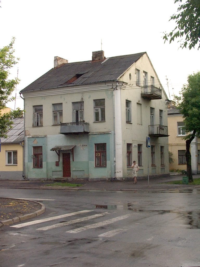 Dům v centrální části běloruského Brestu